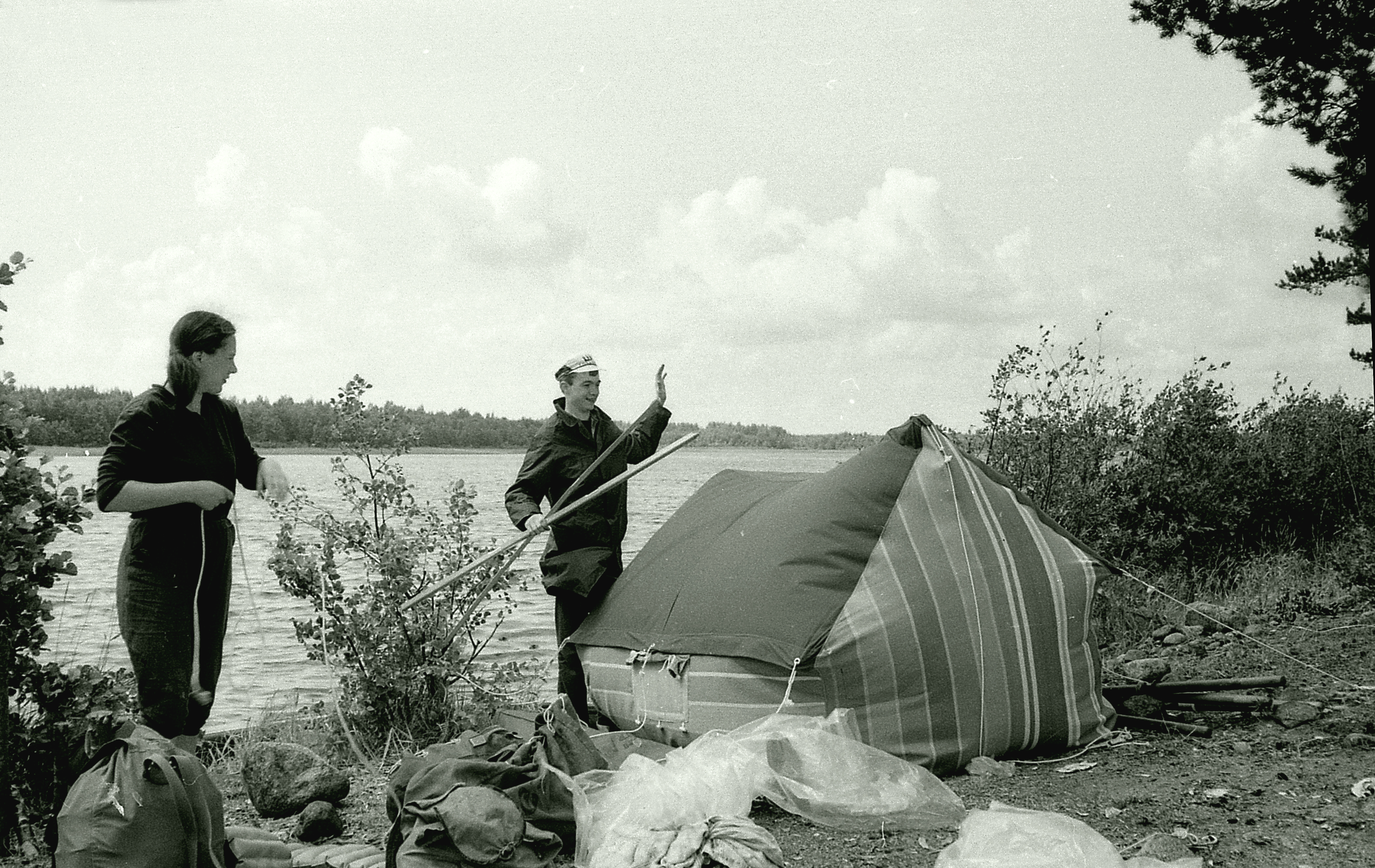 Сильный ветер (река Вуокса)